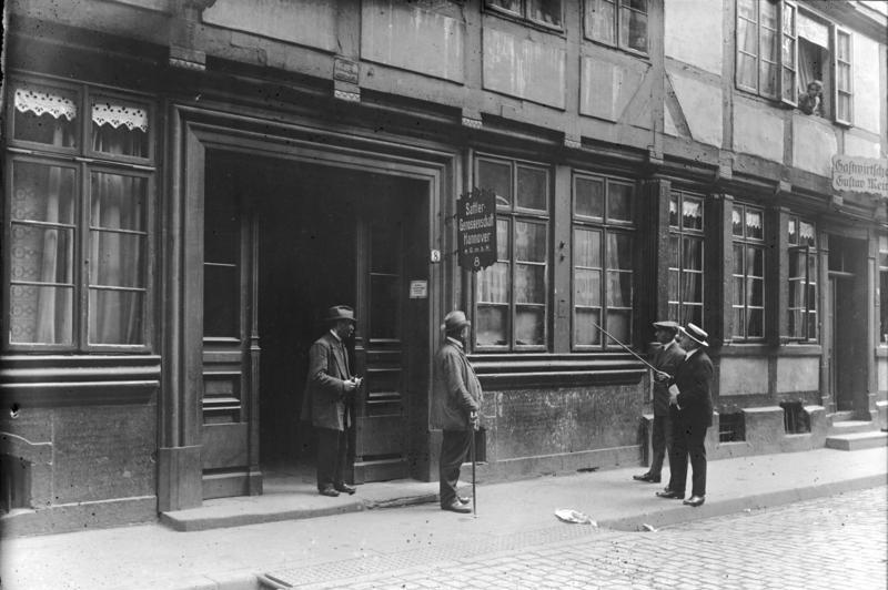 Die ersten autentischen Aufnahmen von dem Massenmörder Haarmann, aus Hannover, welcher 22 Morde auf dem Gewissen hat. (einzige Aufnahmen unseres Sonderbildberichterstatters) Der Wohnraum des Massenmörder Haarmanns, in welchem er seine Opfer umbrachte.